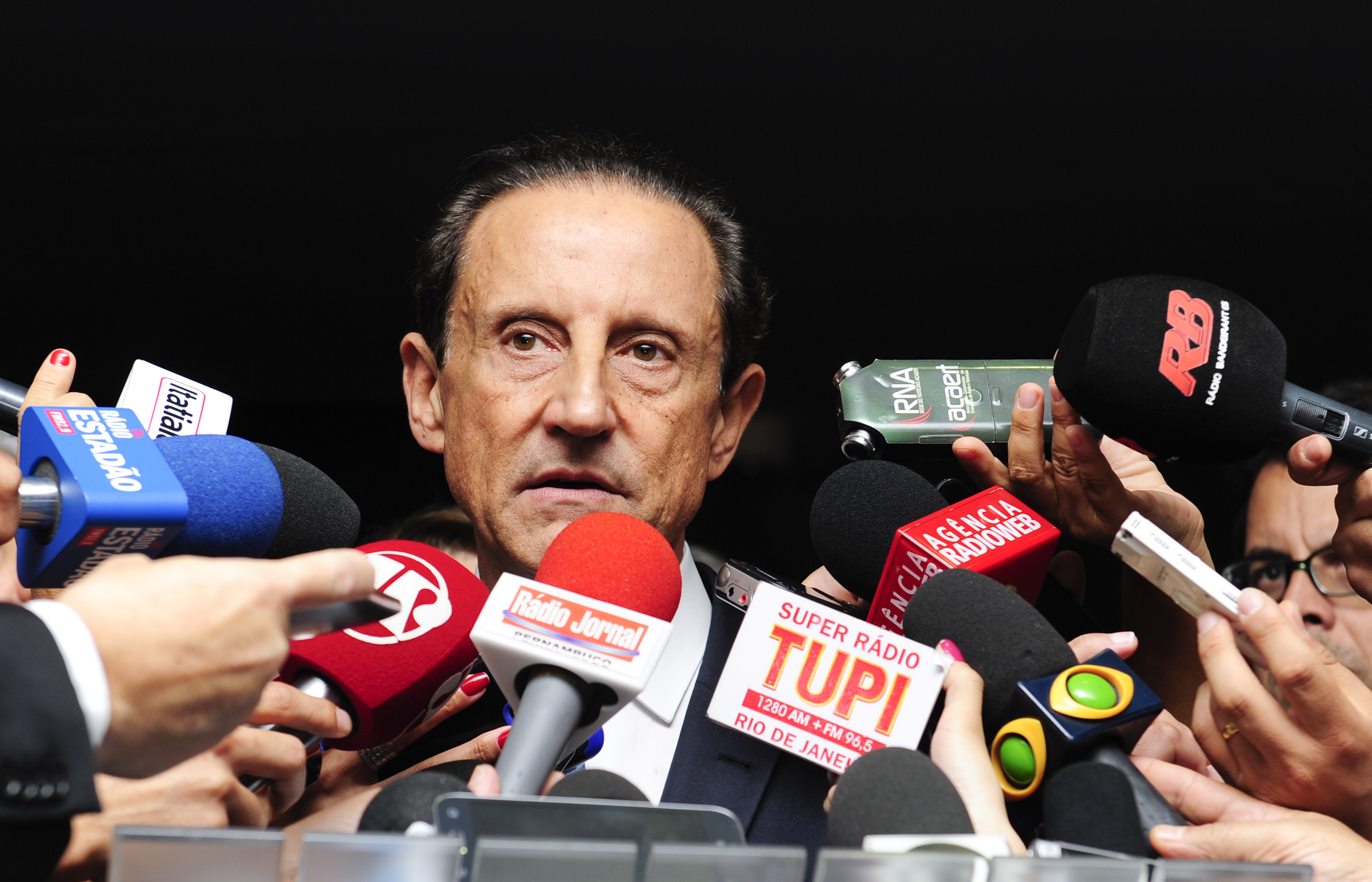 Presidente da FIESP, Paulo Skaf, concede entrevista. Foto: Jonas Pereira/Agência Senado